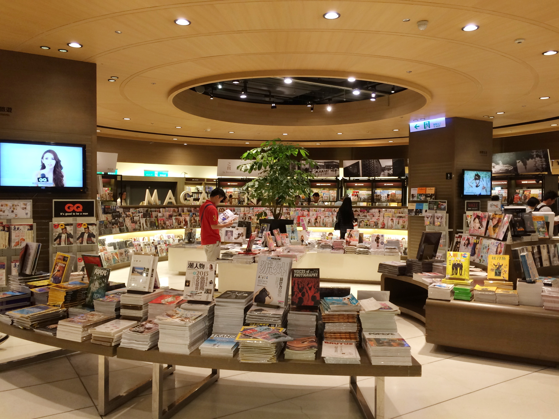 誠品書店信義旗艦店內貌